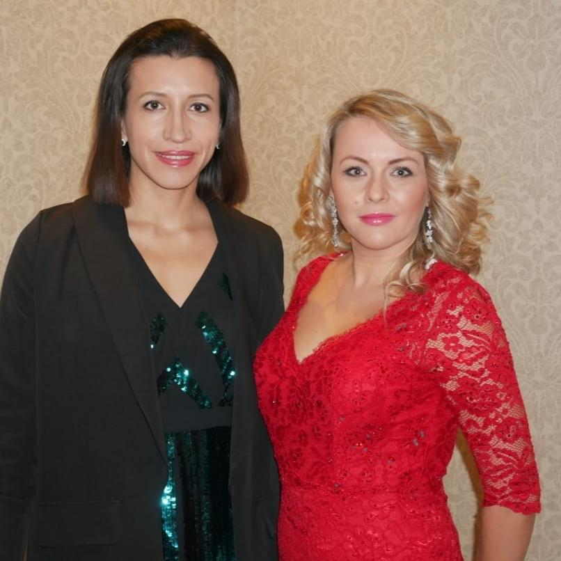 ВИА «Пламя» под руководством Юлии Ариничевой.